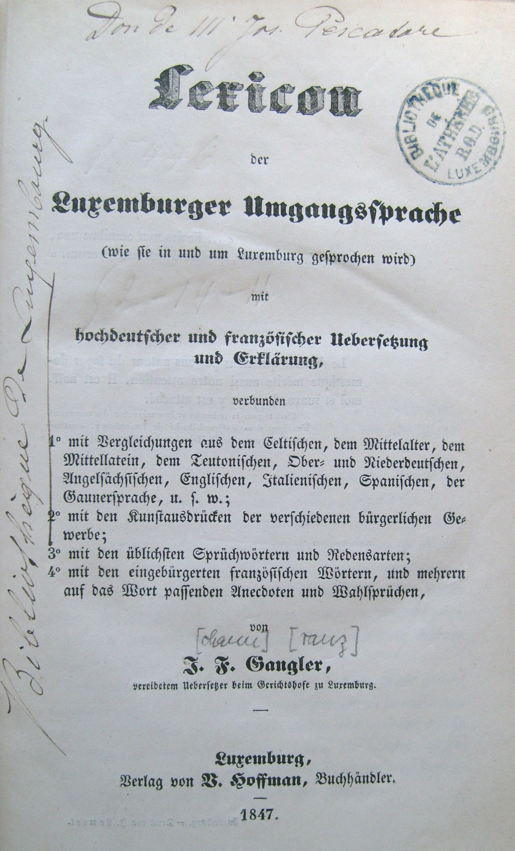 Sujet: Dem Jean-François Gangler säi "Lexicon der Luxemburger Umgangssprache" vun 1847. Bannen-Titelsäit, Exemplaire vun der Lëtzebuerger Nationalbibliothéik.